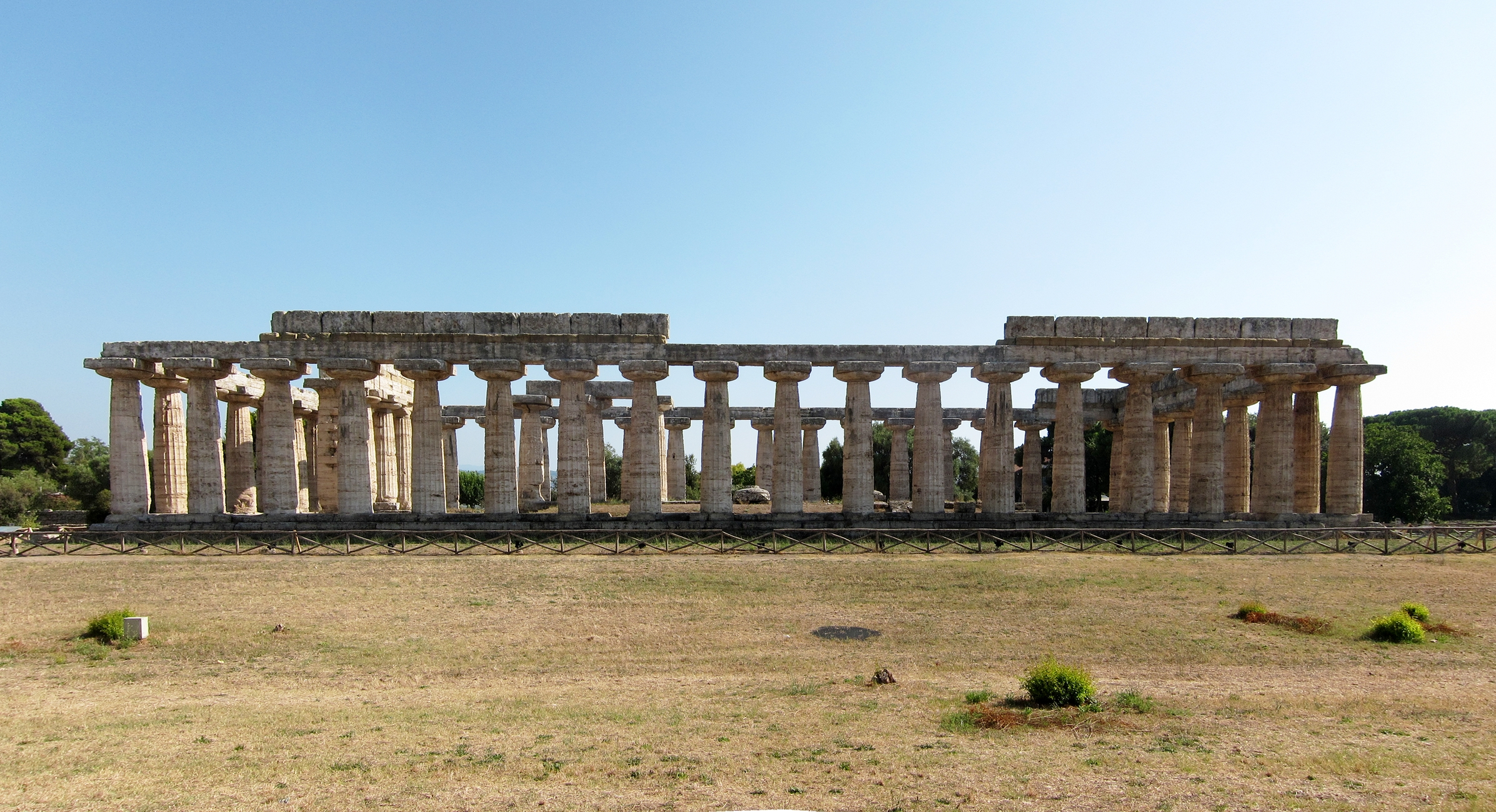 Le temple d'Héra à Paestum (Italie).